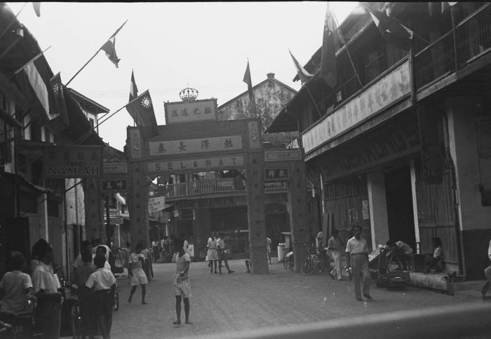 negatief. Straatgezicht in de Chinese wijk van Makassar tijdens de viering van Koninginnedag en het vijftigjarig regeringsjubileum van Koningin Wilhelmina